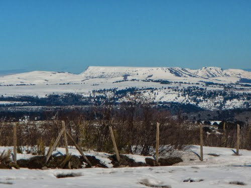 Vn Batea Mahuida desde el noreste was taken by the photographer Juan Francisco Bustos on 14 October 2013 and published over Panoramio. Cerro Batea Mahuida desde el noreste is next to Paso de Pino Hachado and is located in Argentina